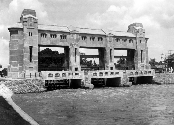 Repronegatief. Benedenstrooms aanzicht van de bandjirsluis Wonokromo, Java